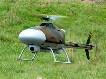 [構成] 無人機|統制装置 追随装置 簡易追随装置 発進装置 機体点検装置 機体運搬装置 作業車 [通信手段]無線・有線 [開発]防衛庁技術研究本部 [製作]富士重工 無人機及び地上装置からなる。無人機はプログラム制御により飛行させることができる。